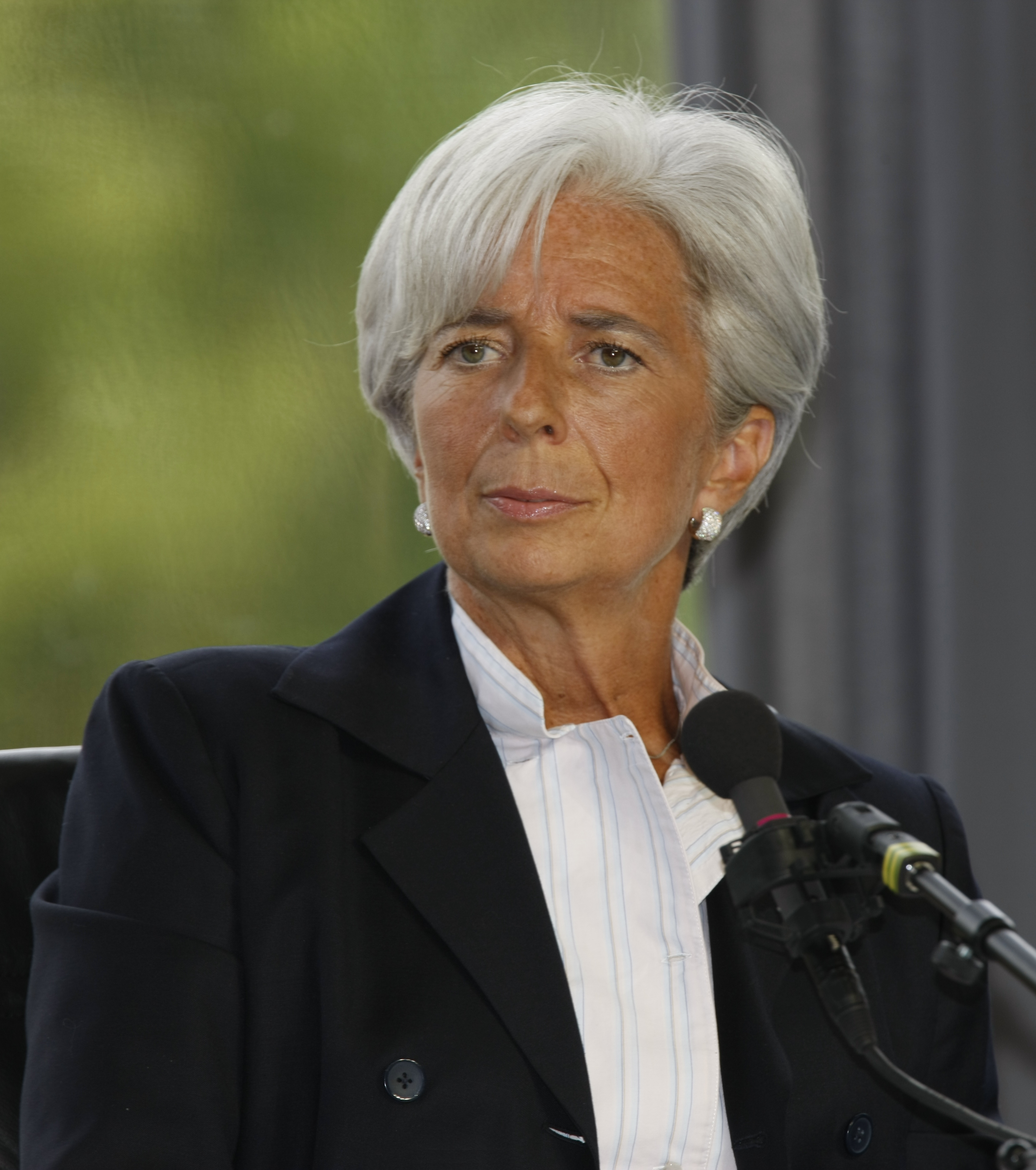 Christine Lagarde à l'Université d'été du MEDEF en 2009.